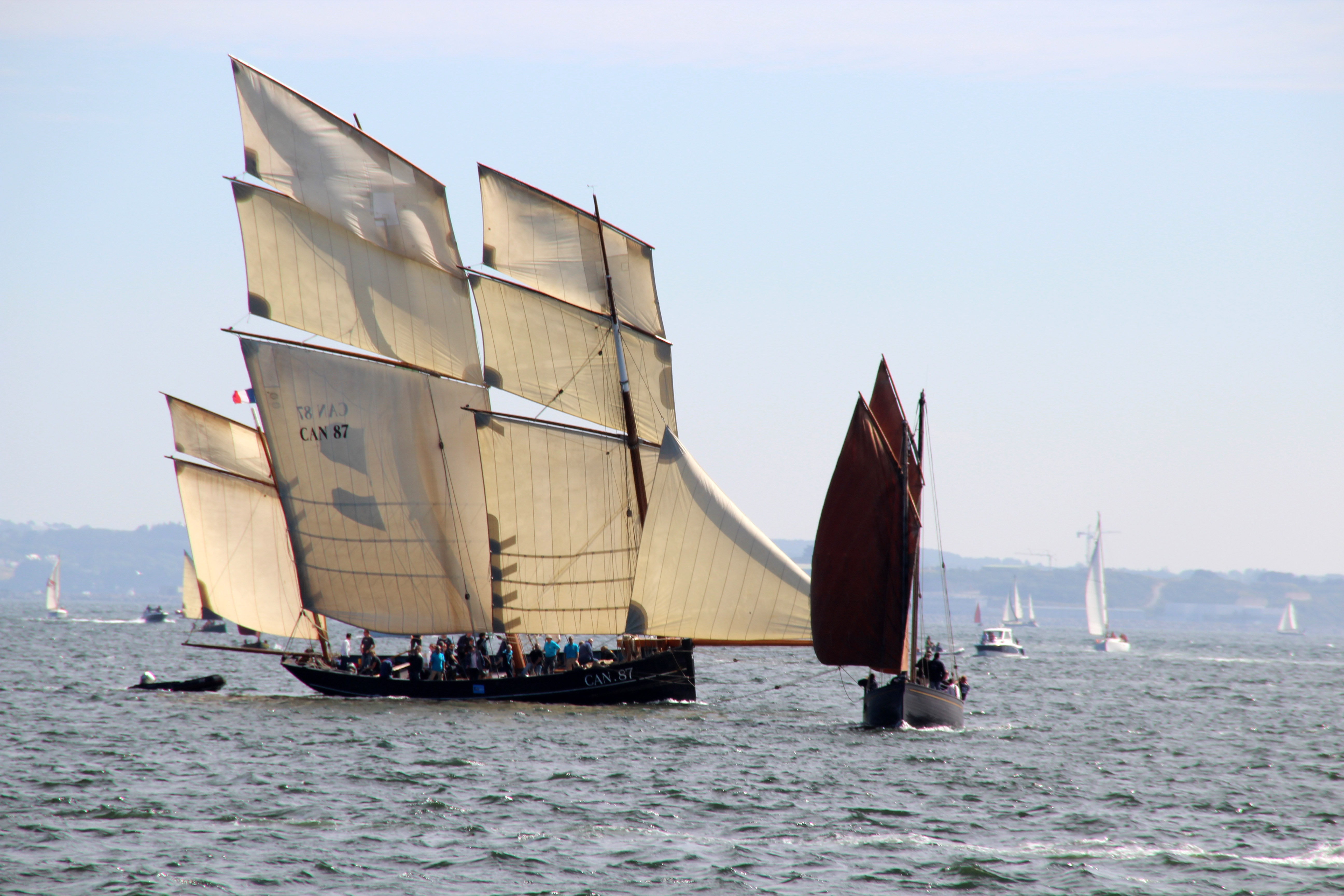 La cancalaise (Bisquine) et Eulalie (à doite) chaloupe sardinière